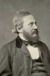 Heinrich Landesmann (1821 - 1902), Rakouský hluchoslepý básník rodem z Moravy.